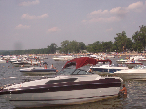 Sylvan Beach Oneida Lake